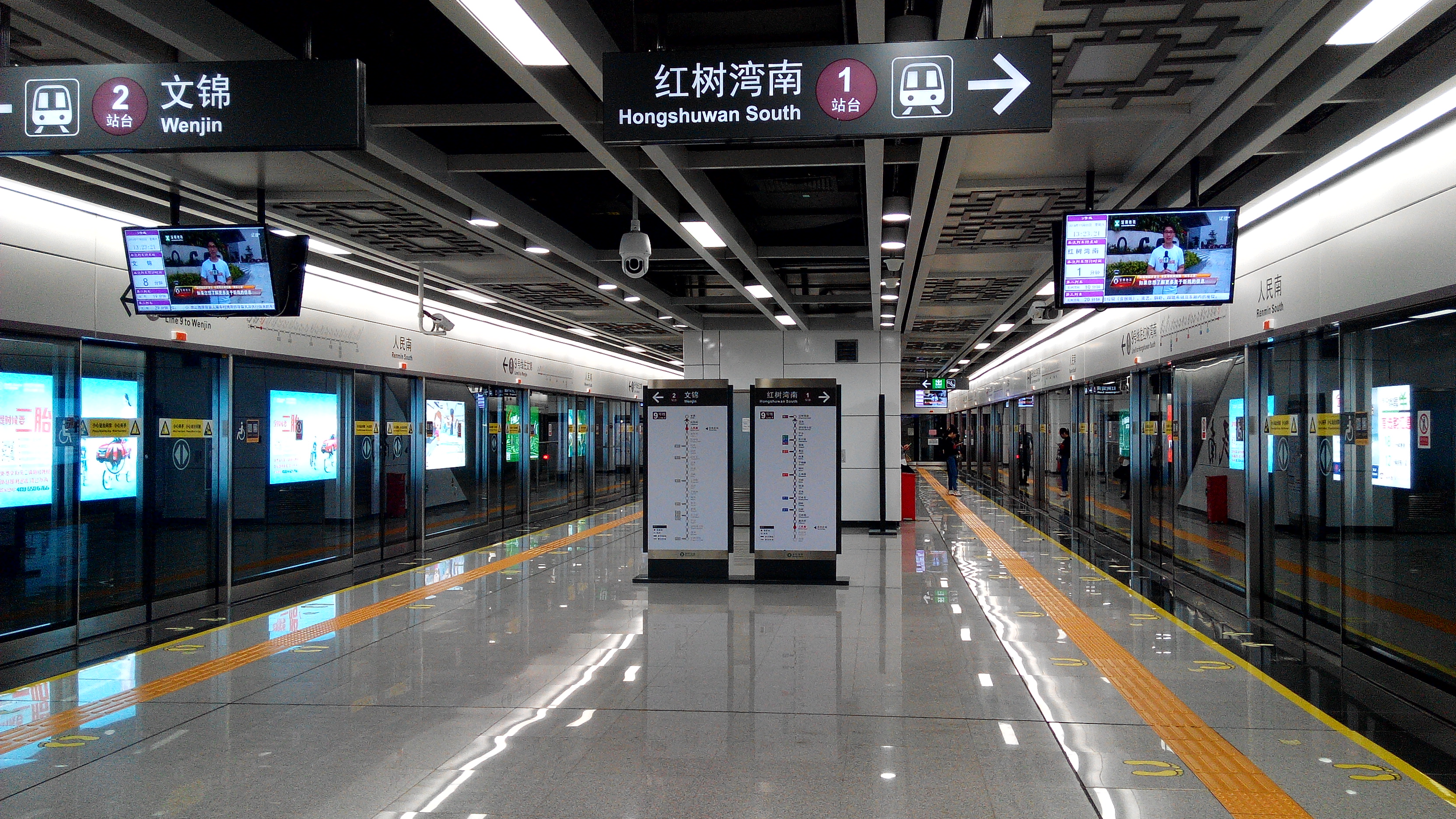 深圳地铁9号线 人民南站站台